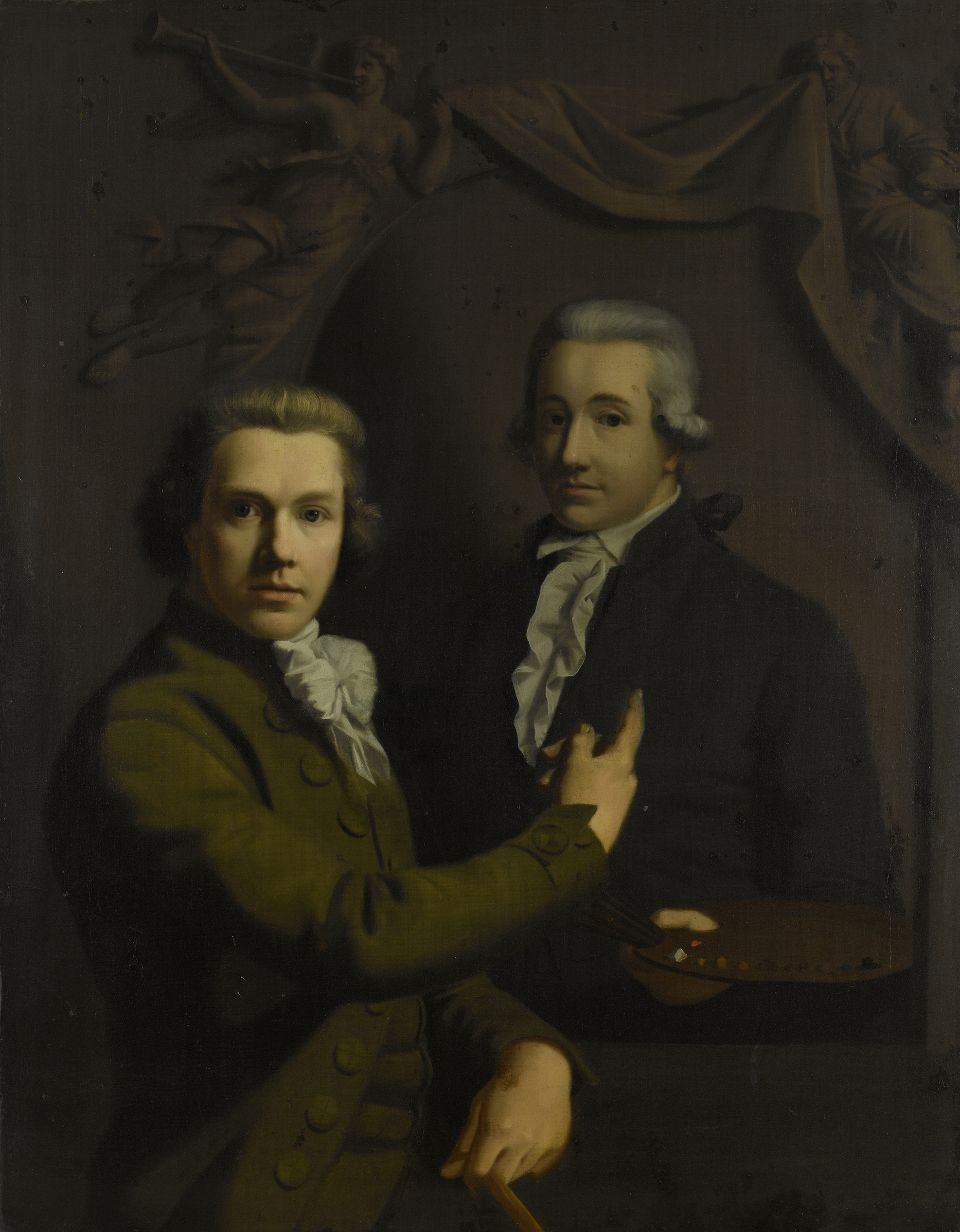 Zelfportret van Willem Bartel van der Kooi, staand ten halven lijve, wijzend naar het portret van zijn gestorven collega Dirk Jacobsz Ploegsma. Ploegsma is voorgesteld met palet en penselen in de hand, boven het portret een treurende allegorische figuur (Schilderkunst?) en de Faam.